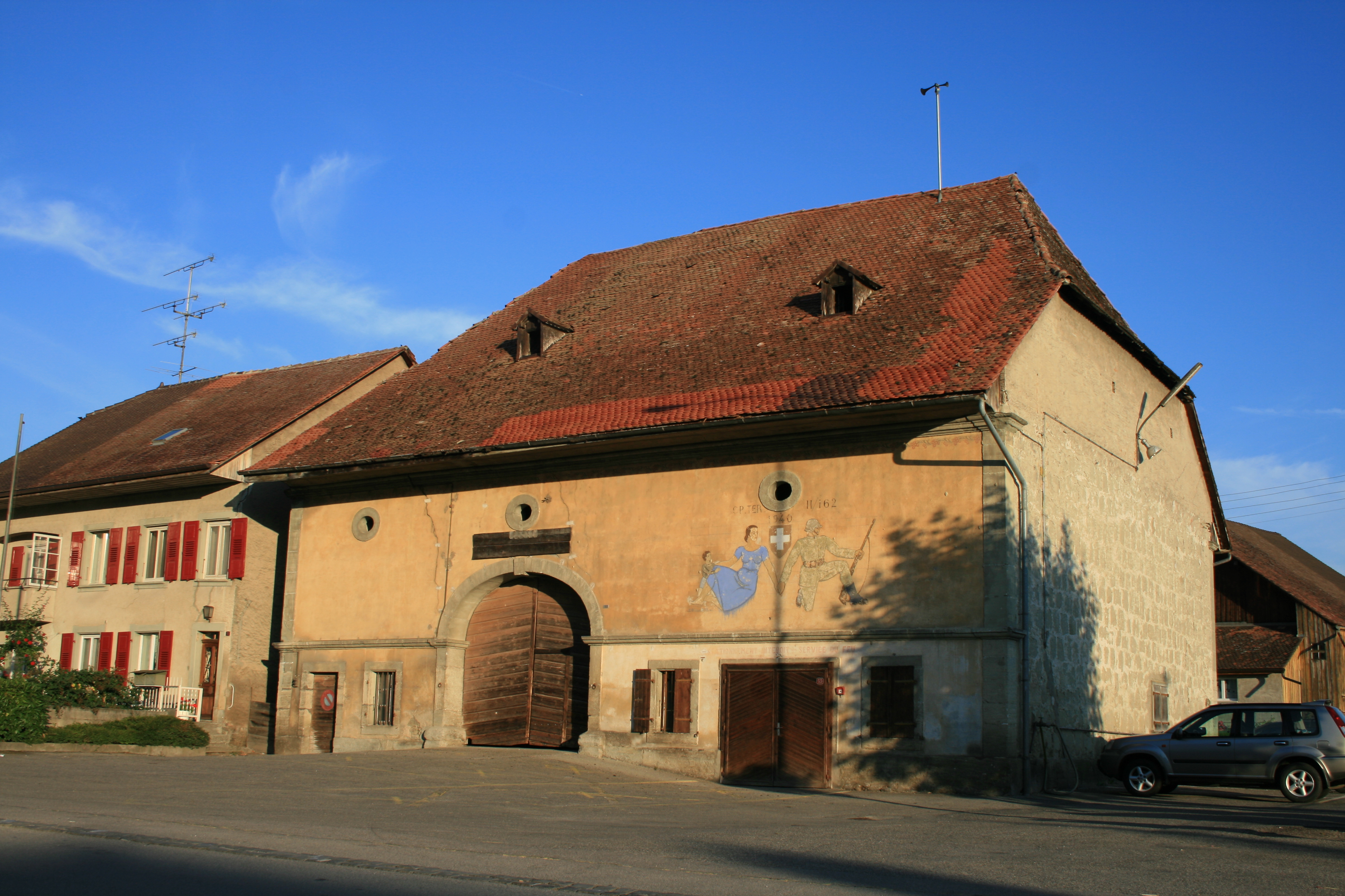 Corselles VD, Schweiz